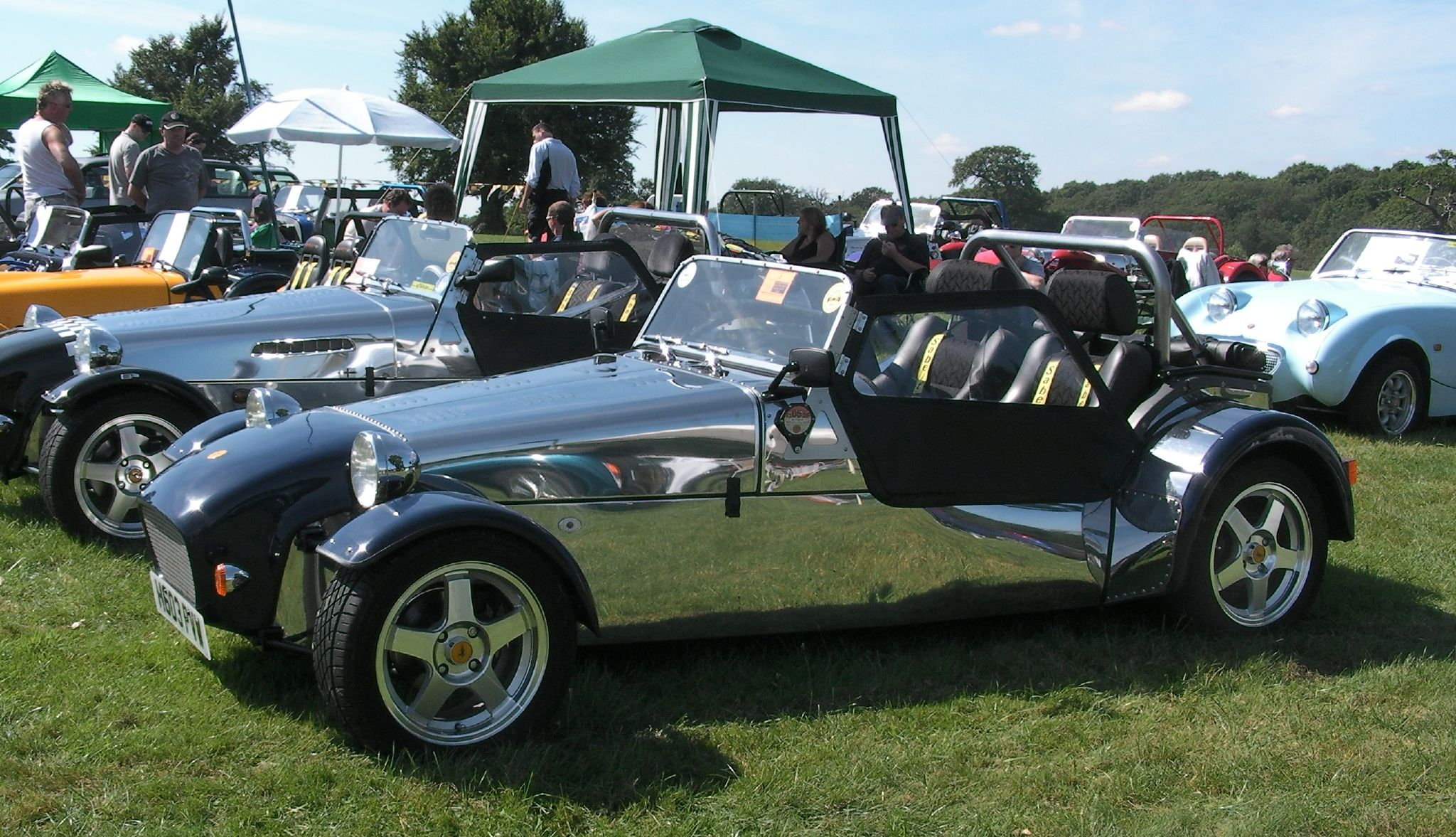 Stainless Steel Lotus